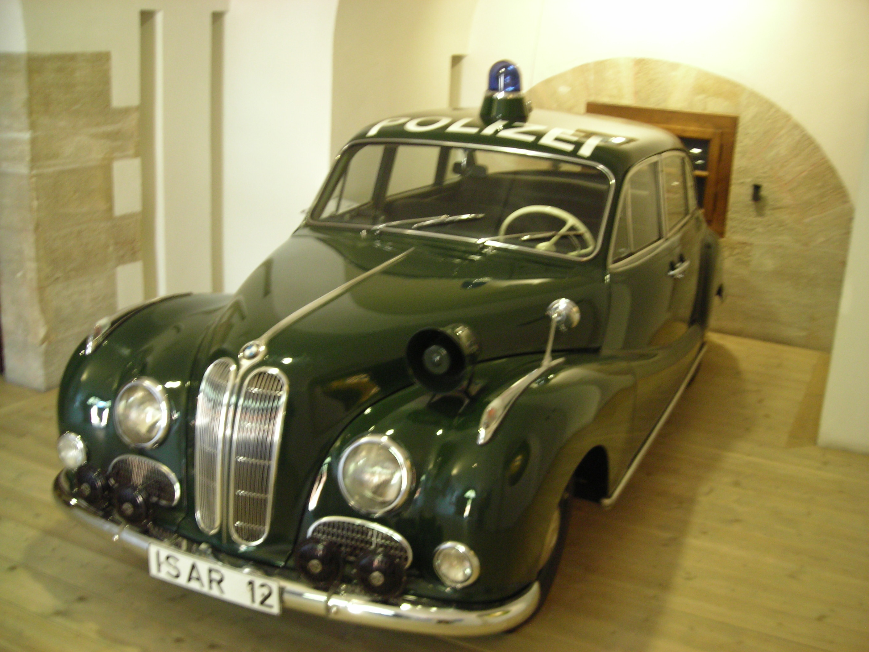 BMW 501 als Streifenwagen (verwendet 1961 bis 1971 beim Polizeiamt München, Funkrufname Isar 12) - Exponat bei der Sonderausstellung 60 Jahre Bayerische Polizei in Ingolstadt